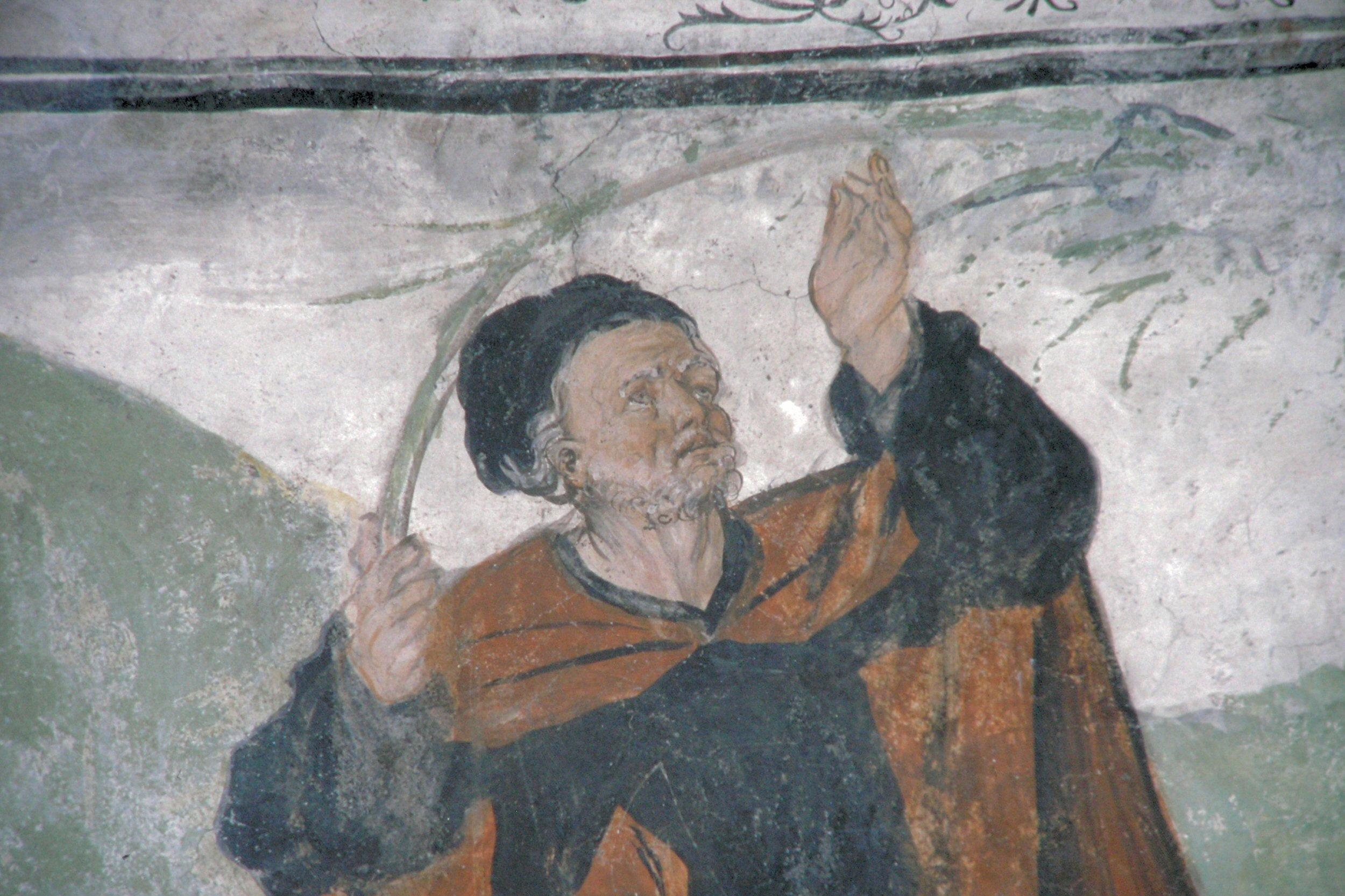 detail